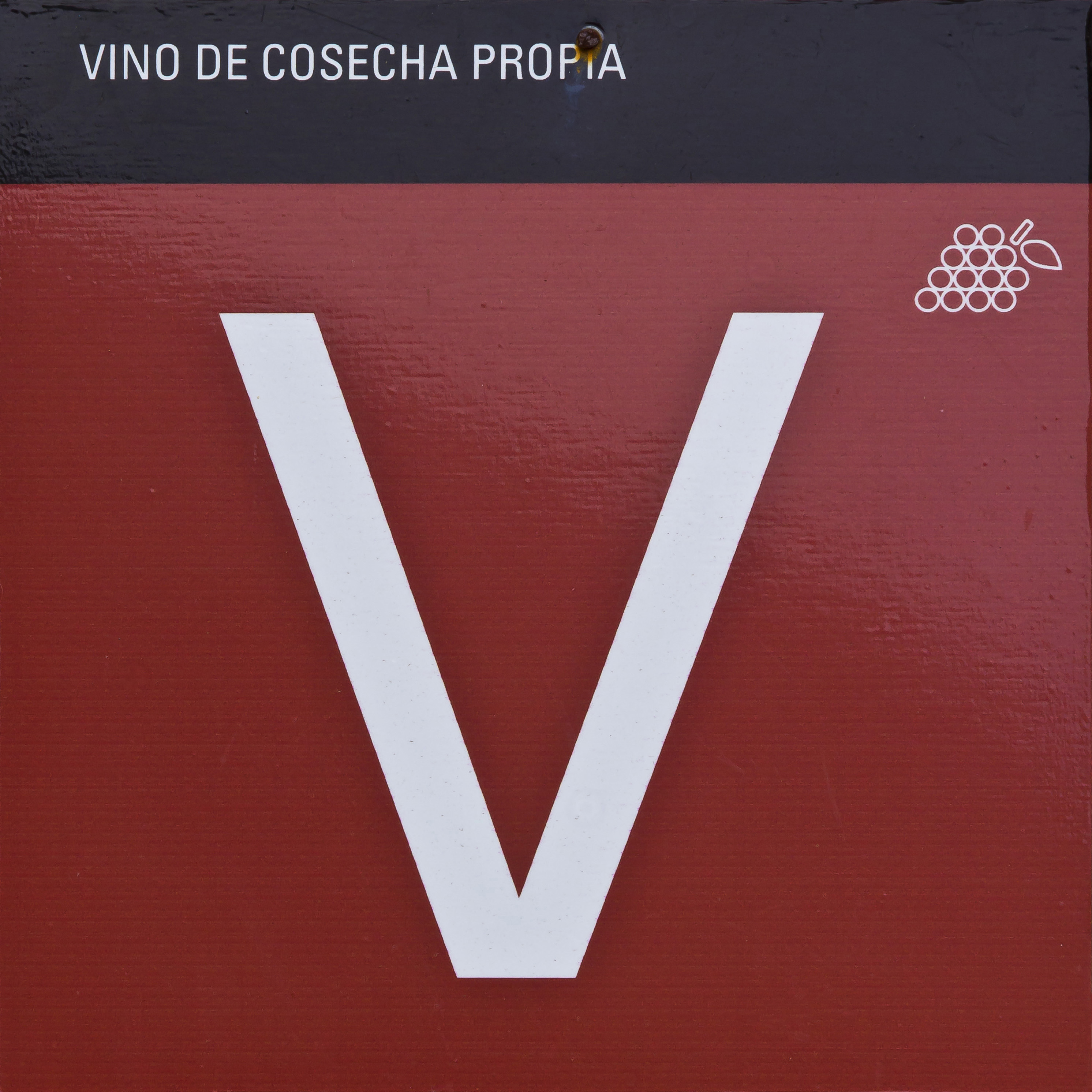 Placa distintivo Guachinche - Vino de cosecha propia según DECRETO 83/2013, de 1 de agosto, Presidencia del Gobierno de Canarias